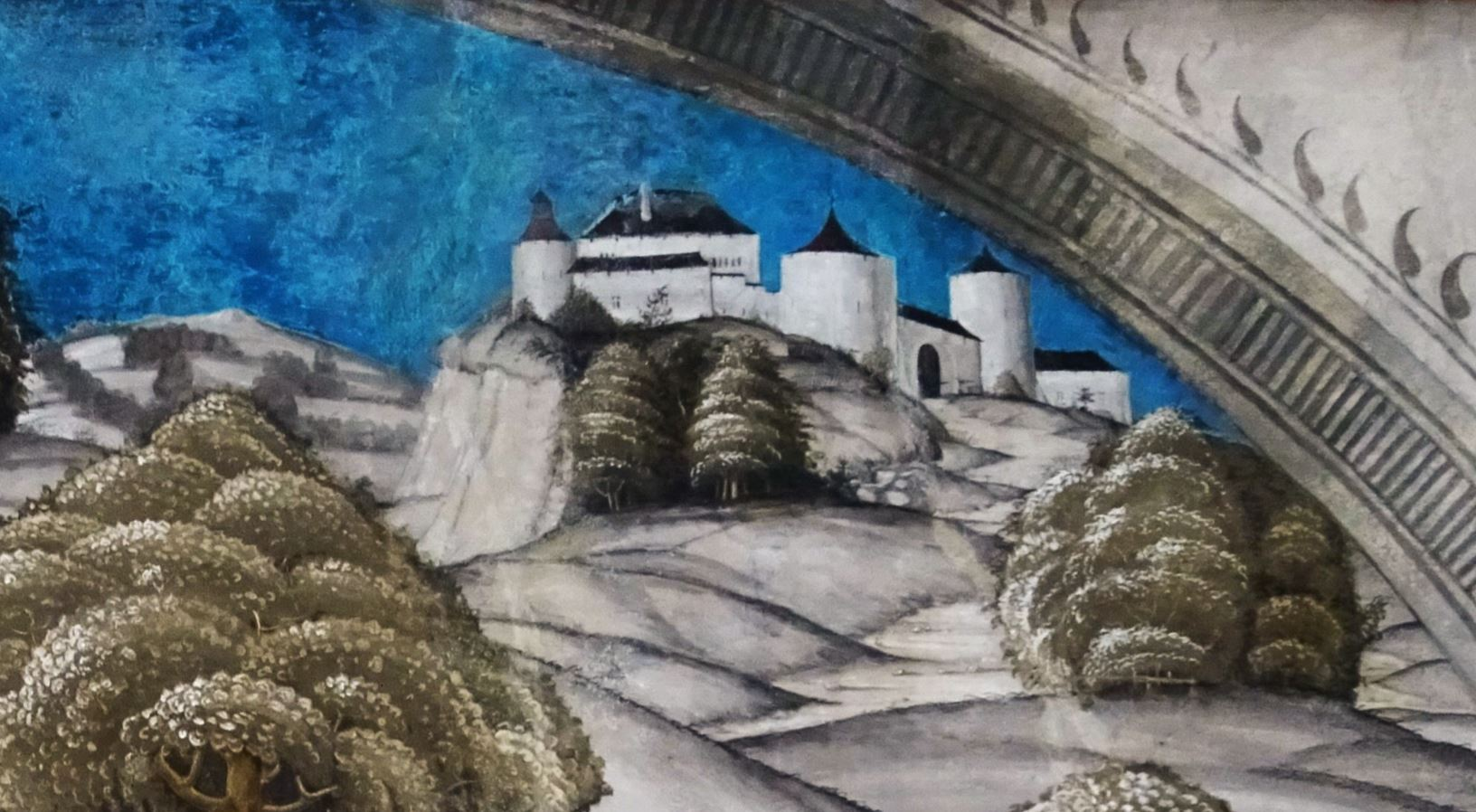 Wandbild/ Fresco im Kloster Sankt Georgen in Stein am Rhein. Das Bild zeigt das Hinterland von Zurzach. Es muss sich also um die Küssaburg handeln. Das Fresco entstand um 1515. Beteiligte Maler: Tomas Schmid und Ambrosius Holbein.